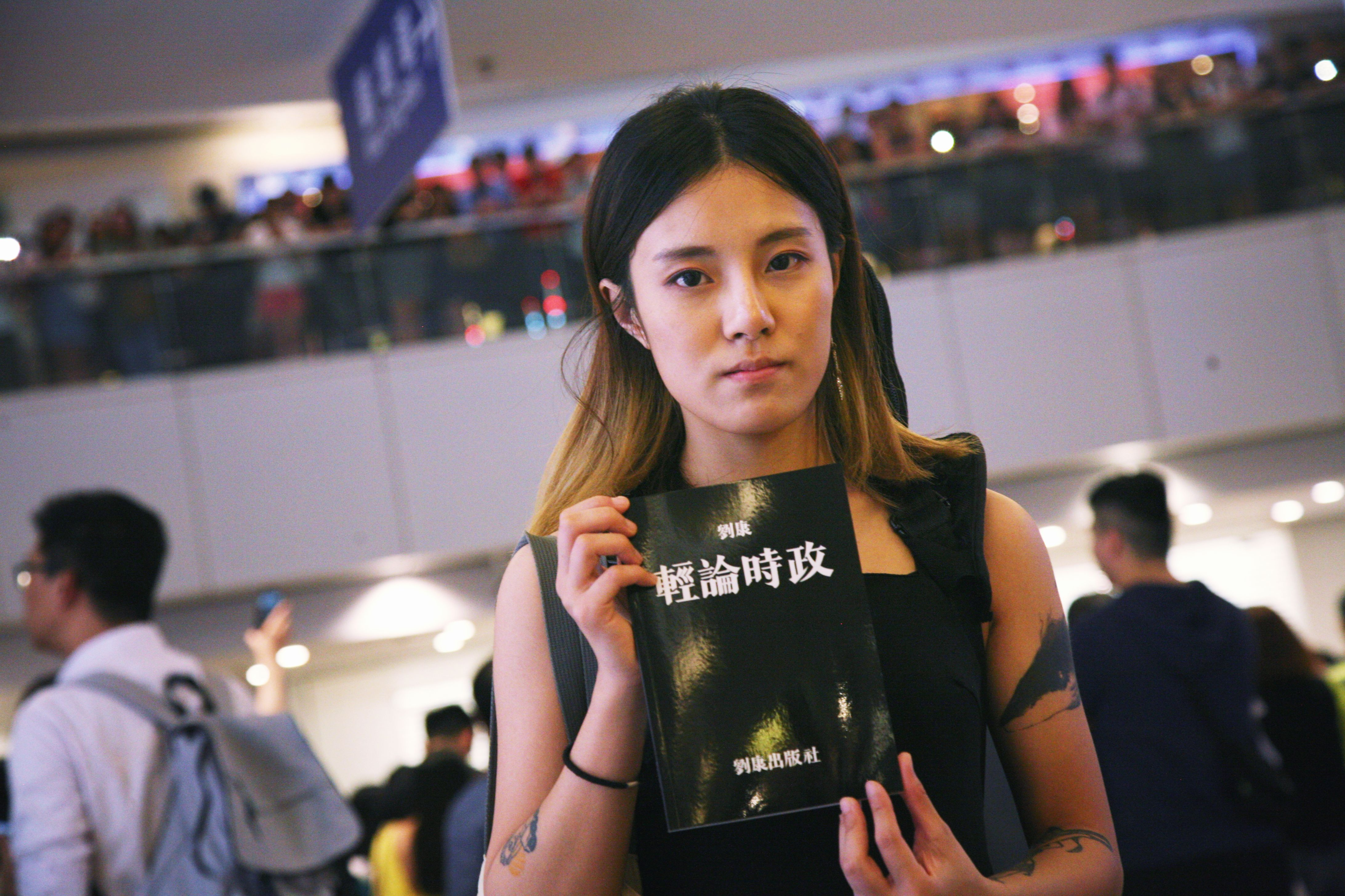 黃子悅展示劉康著作《輕論時政》。